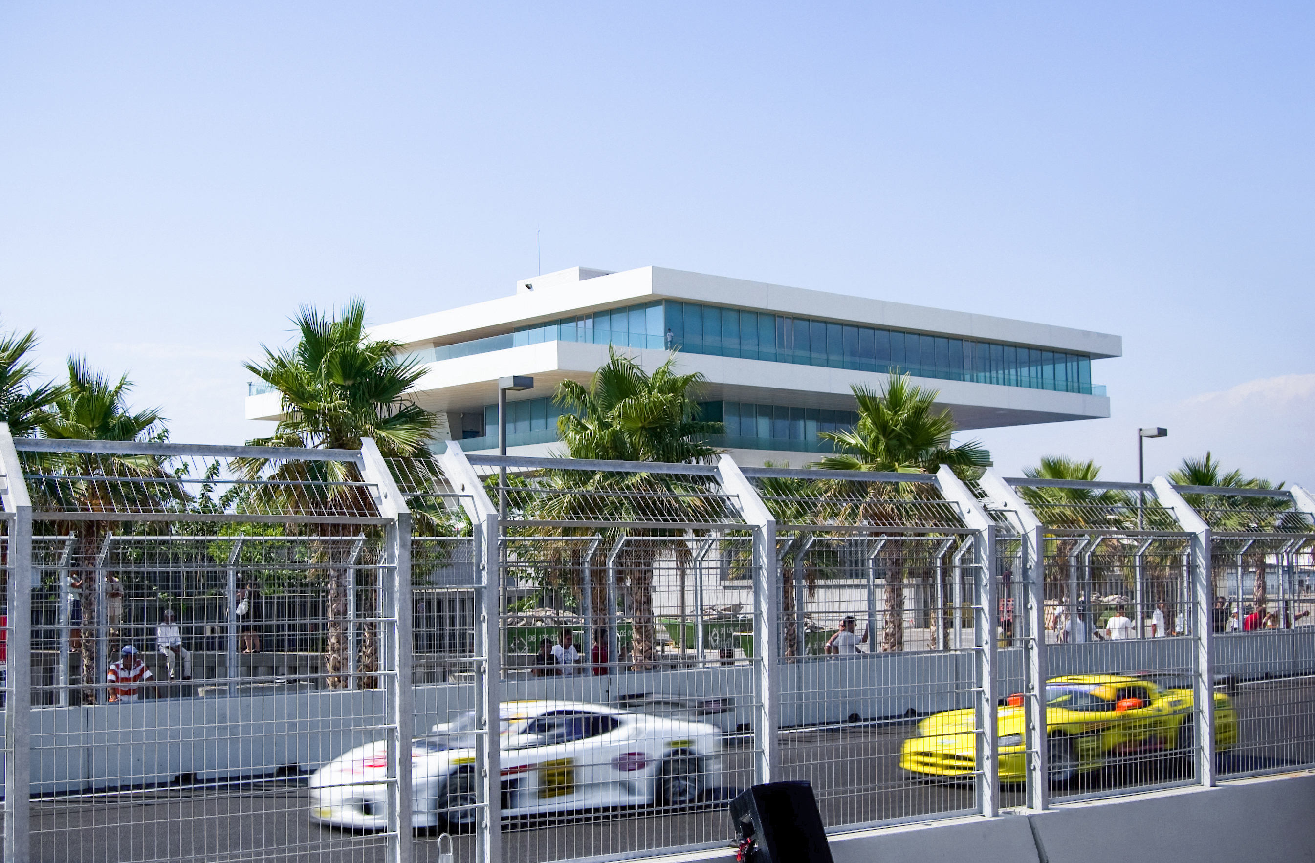 Valencia Street Circuit GT Open